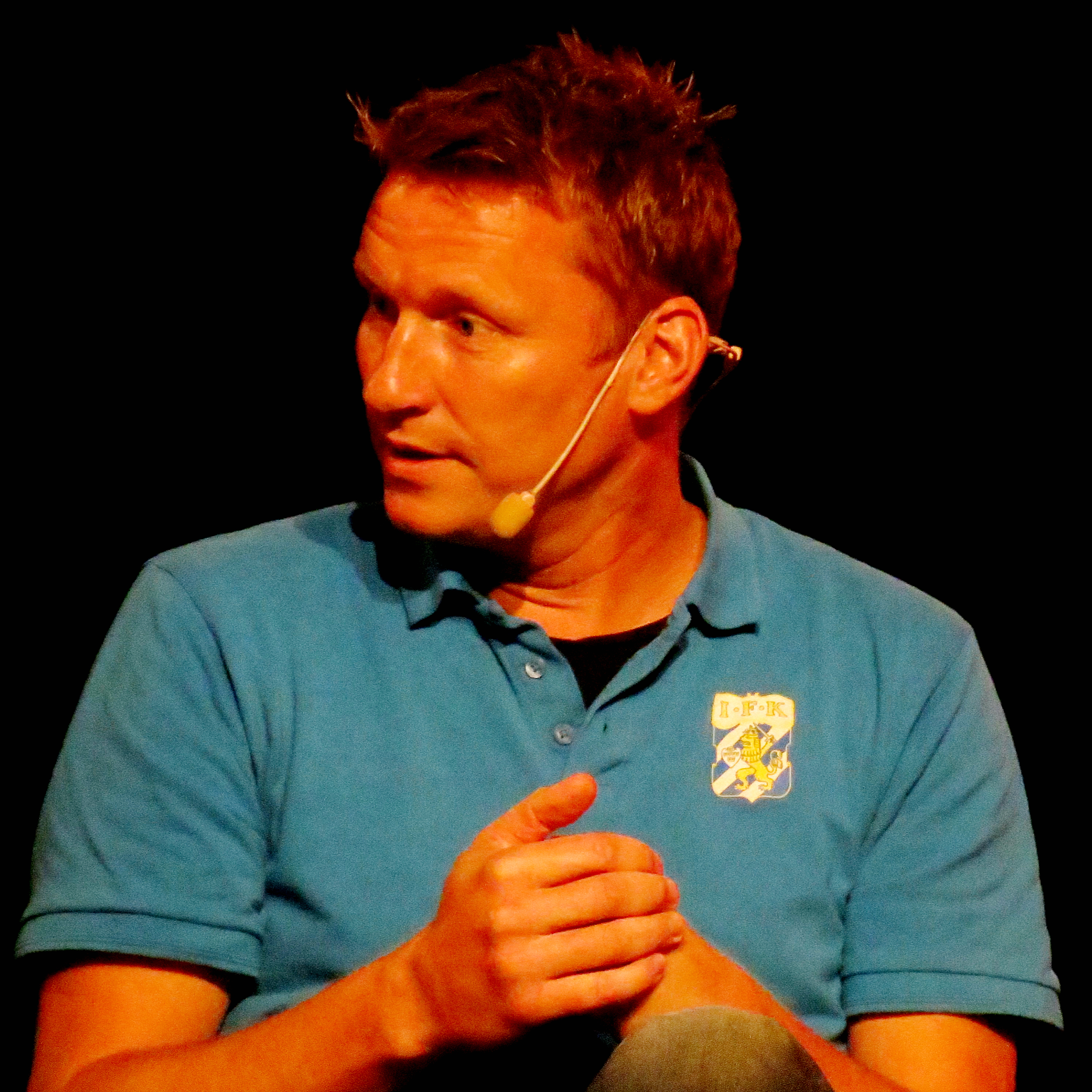 Kennet Andersson på Bokmässan i Göteborg 2014.